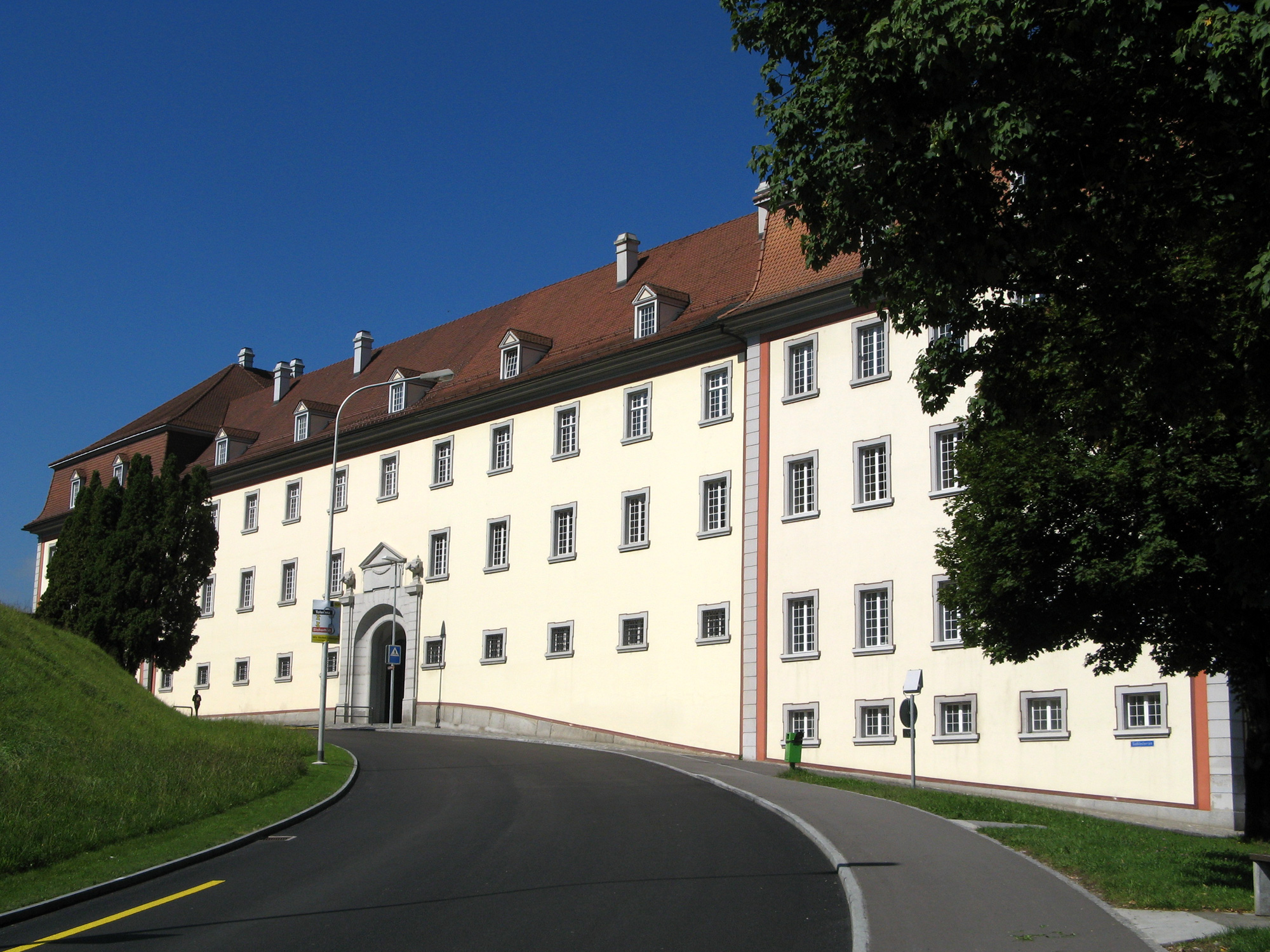 Südflügel des Klosters Muri